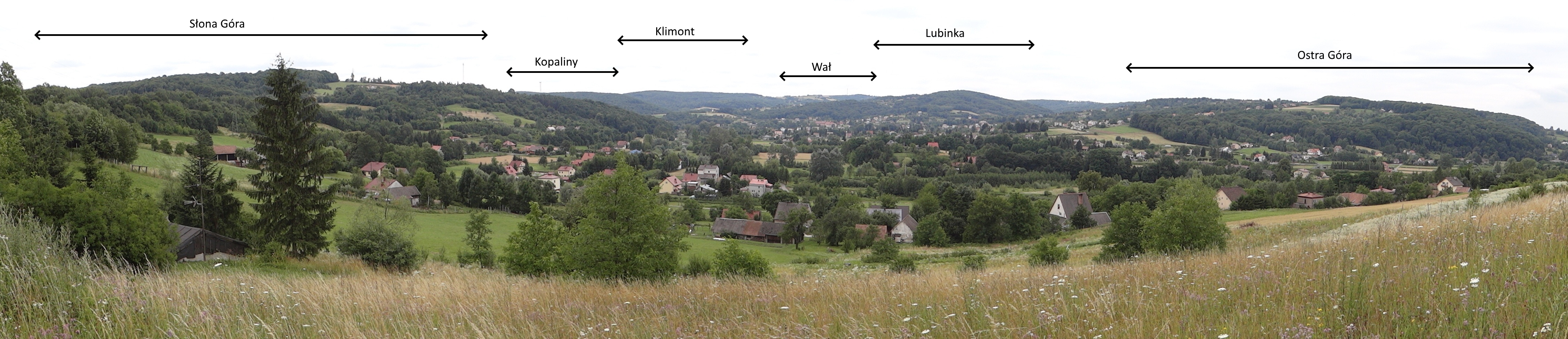 Panorama widokowa miejscowości Woźniczna